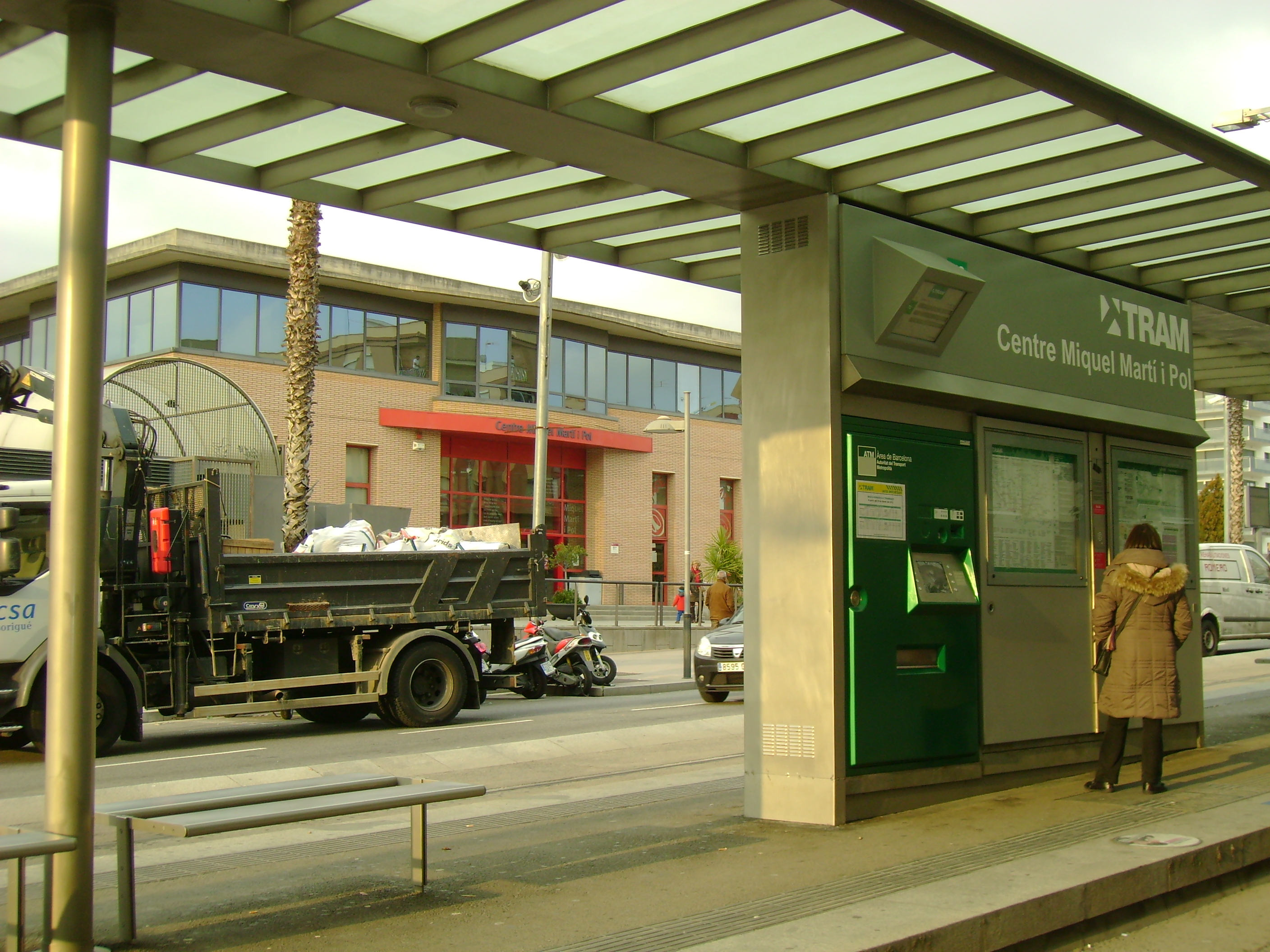 Foto capturada per la meva càmara a l'estació de Centre Miquel Martí i Pol (Trambaix).